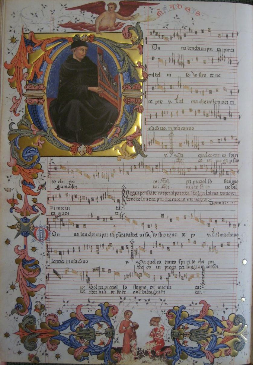 Donna, bench'i' mi parta dal bel viso, Codex Squarcialupi